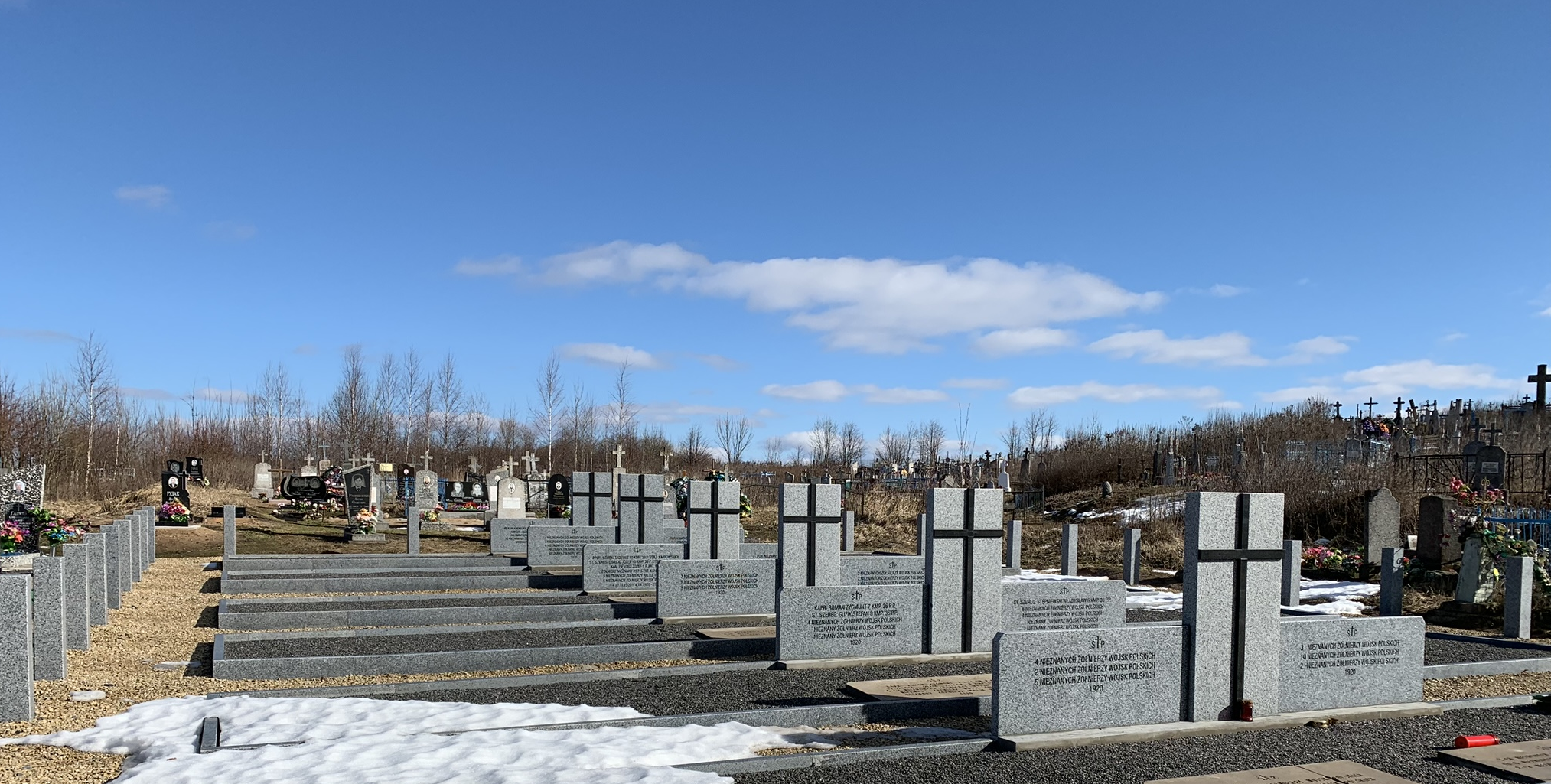 Пахаванні жаўнераў польска-савецкай вайны 1920-1921 гг.